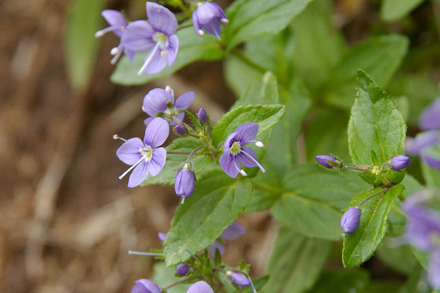 エゾヒメクワガタ（北海道富良野岳）Veronica stelleri var. longistyla (Mt. Furano, Hokkaido, JAPAN)